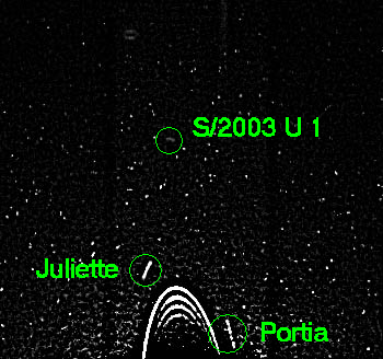 Image saisie par le télescope spatial Hubble le 25 août 2003 montrant la lune uranienne S/2003 U 1 Source : NASA ( La portion centrale supérieure de l'image originale a été retenue et les lunes Portia, Juliette et S/2003 U 1 identifiées.